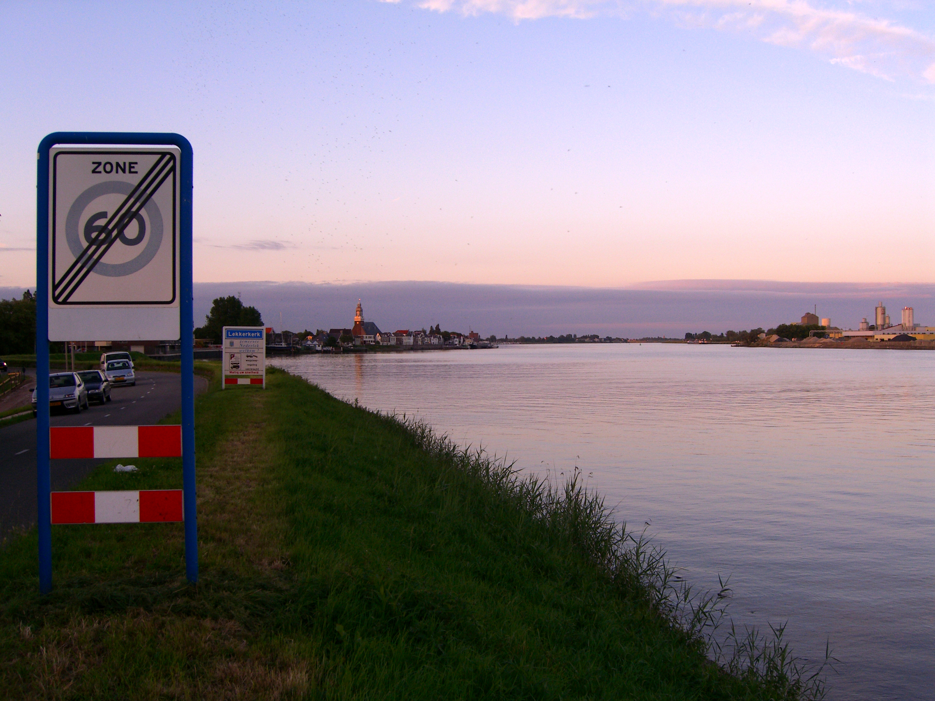 Binnenkomst via de dijk (van Krimpen aan de Lek naar Lekkerkerk).